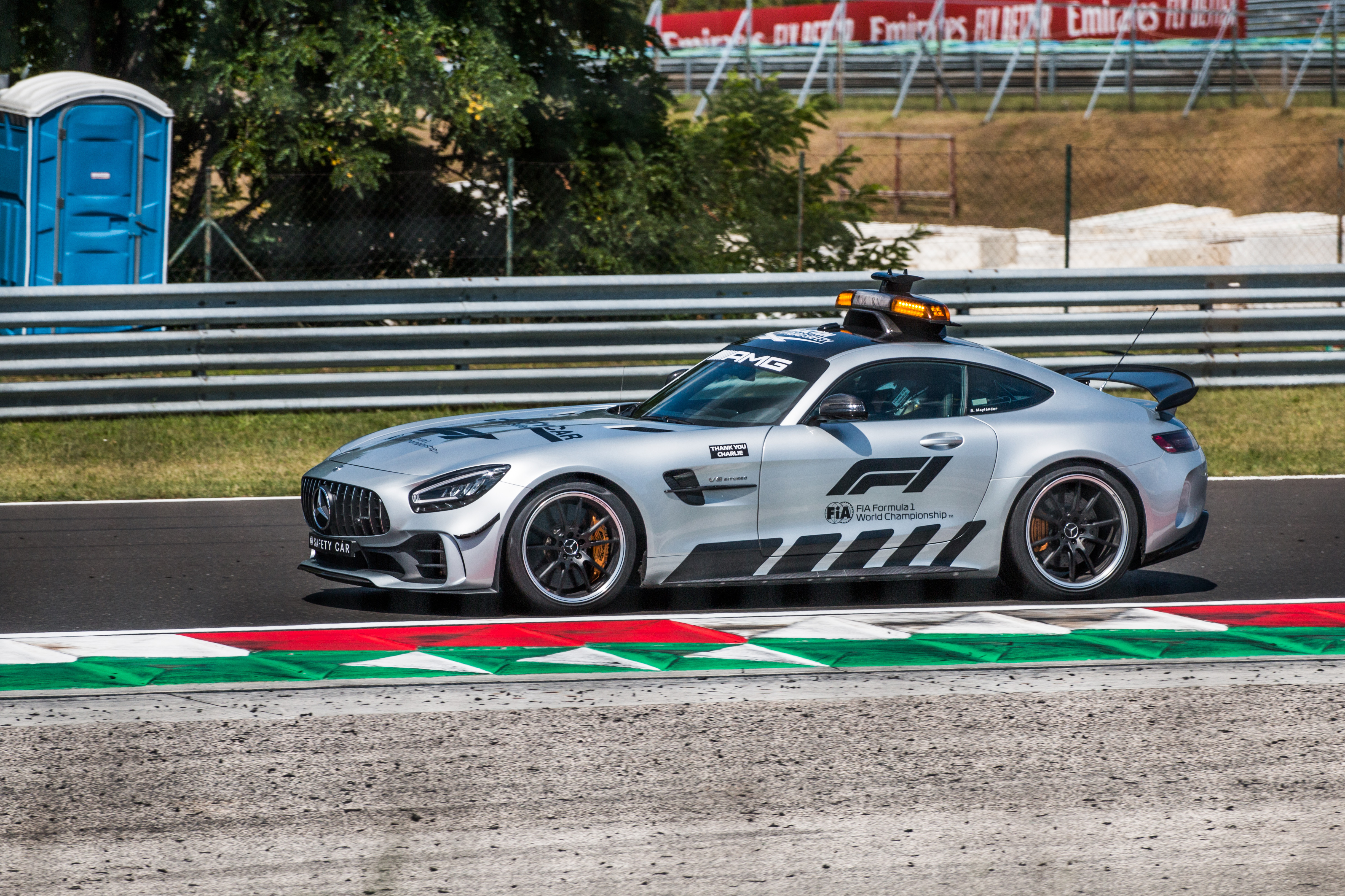 Bernd Maylander driving Formula 1 Safety Car Mercedes-AMG GT R during Hungarian GP 2019